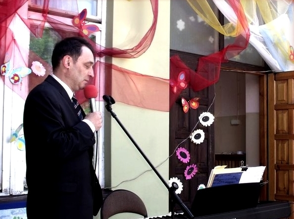 Robert Grudzień, artysta muzyk, kompozytor, dyrektor festiwali muzycznych - Honorowy Przyjaciel Szkoły w Wolanowie podczas koncertu dla uczniów.